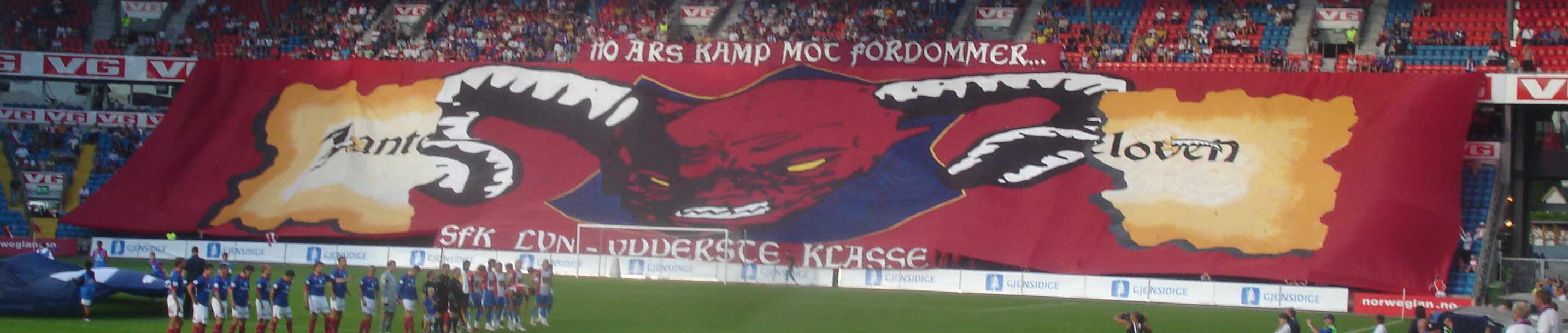 Her er et bilde av Fc Lyn Oslo sin tifo fra VIF-Lyn 2006